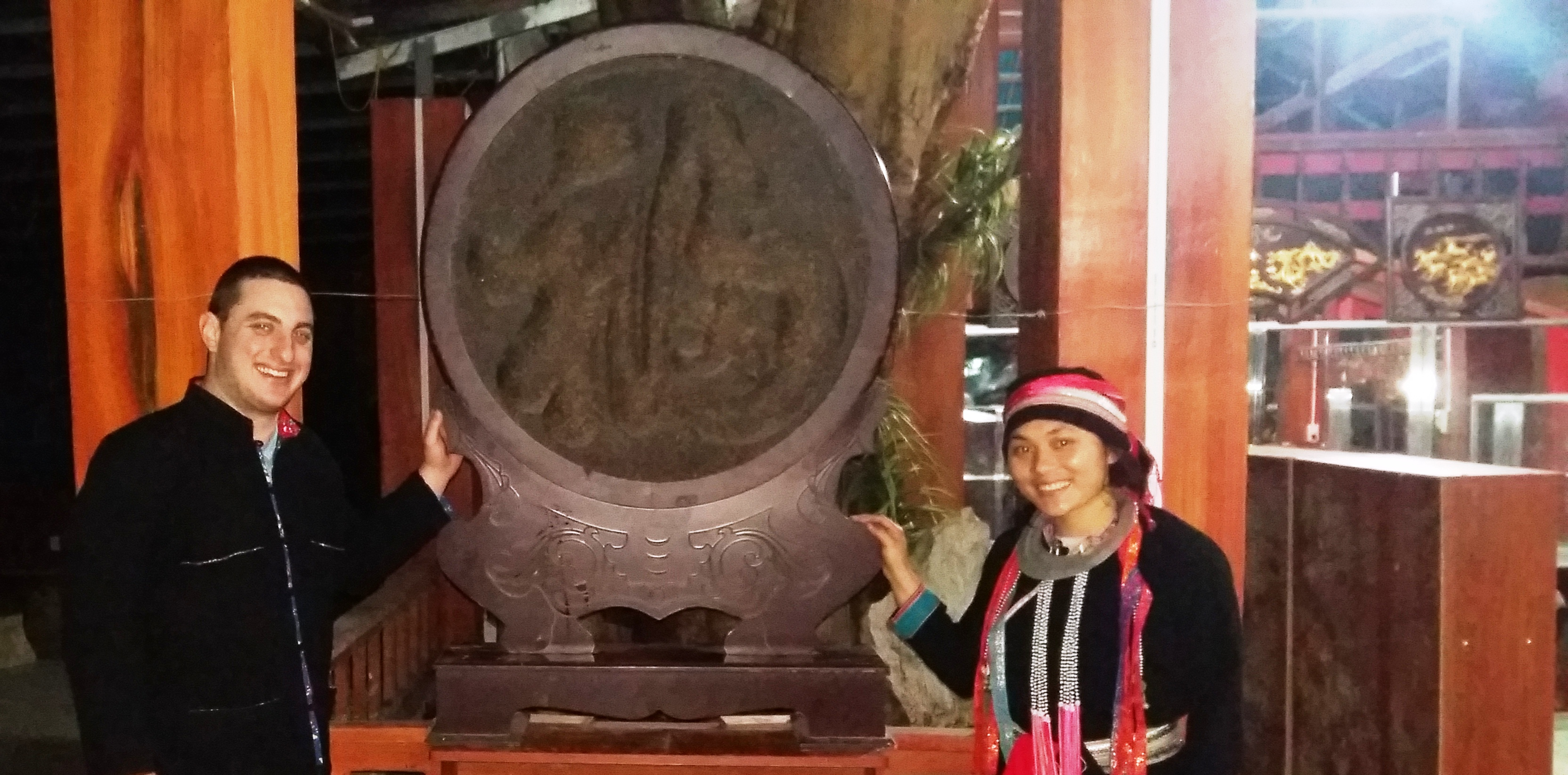 Bánh Trà Phổ Nhĩ trưng bày tại Tea House of Baiyue tribe in Ha Giang, Vietnam